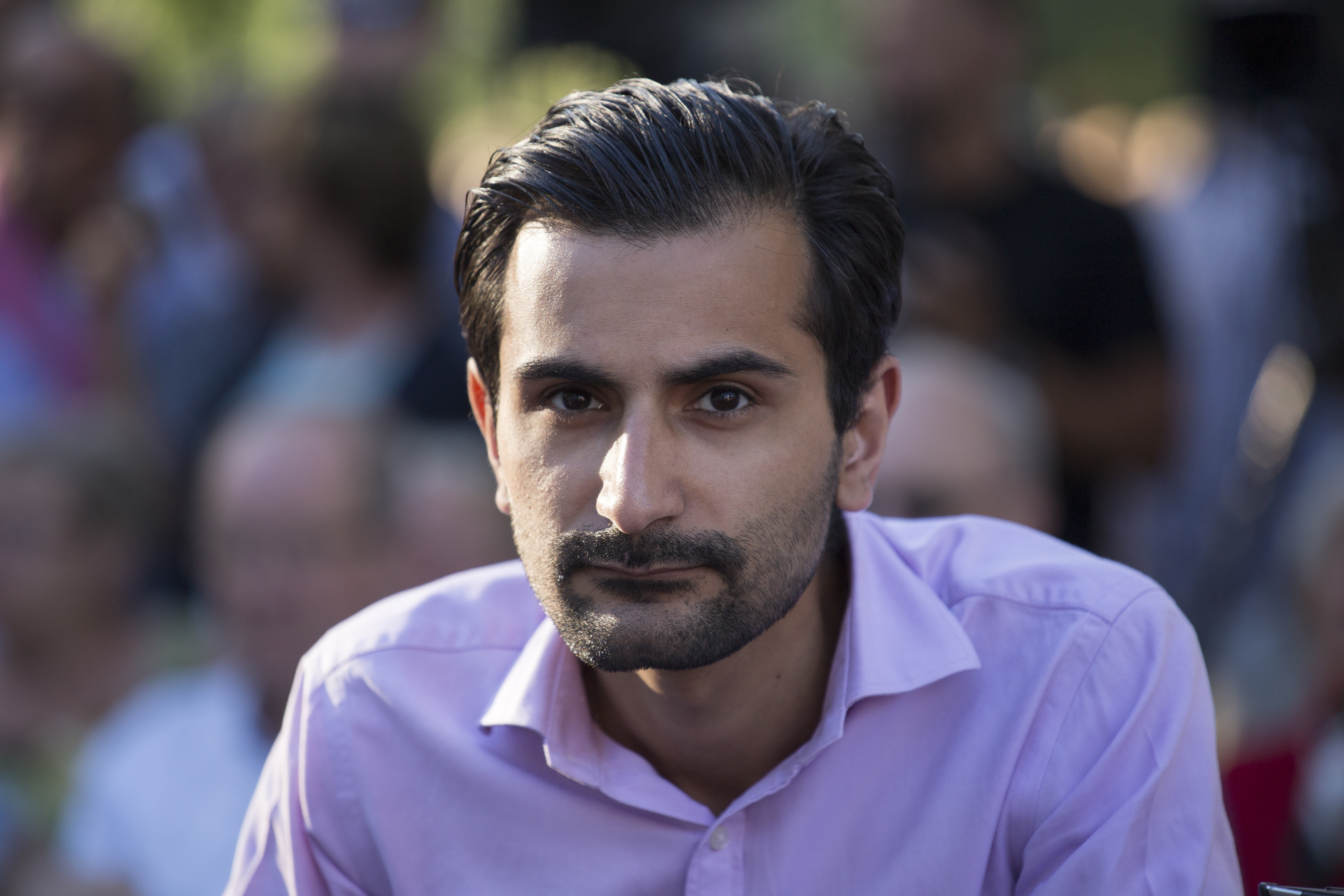 Hanif Bali